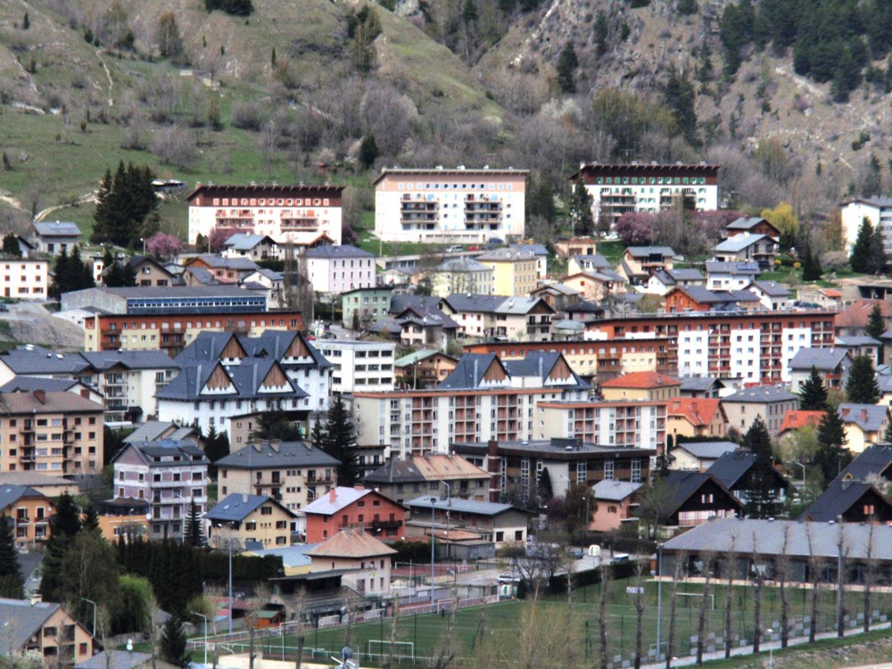 Vue sur le quartier de Loutraz